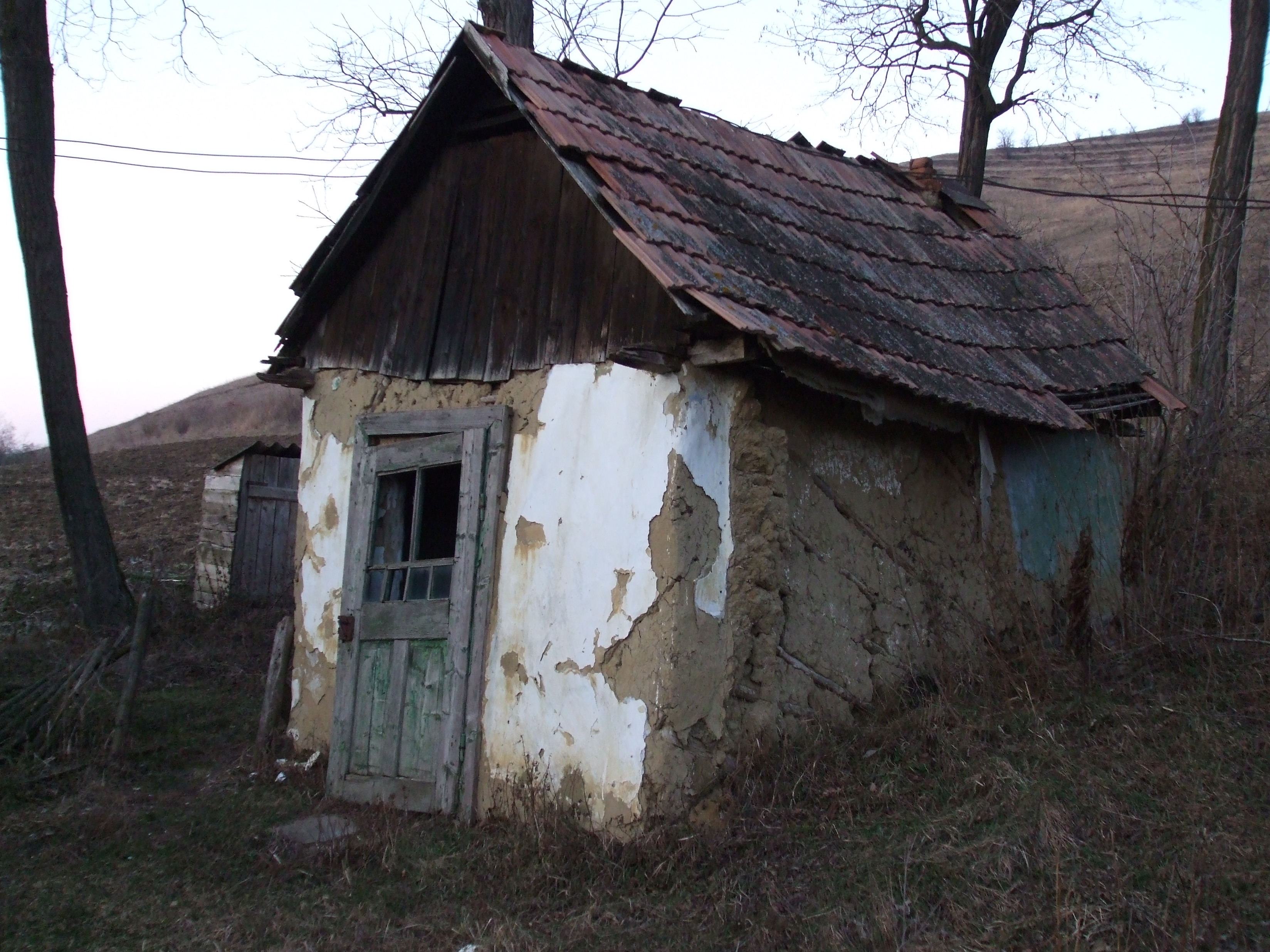 Casă veche , de lemn , din Aruncuta ,specifică anilor 1850 - 1910 {schelet din lemn de pădure , tencuit cu un amestec de argilă ,pleavă si bălegar